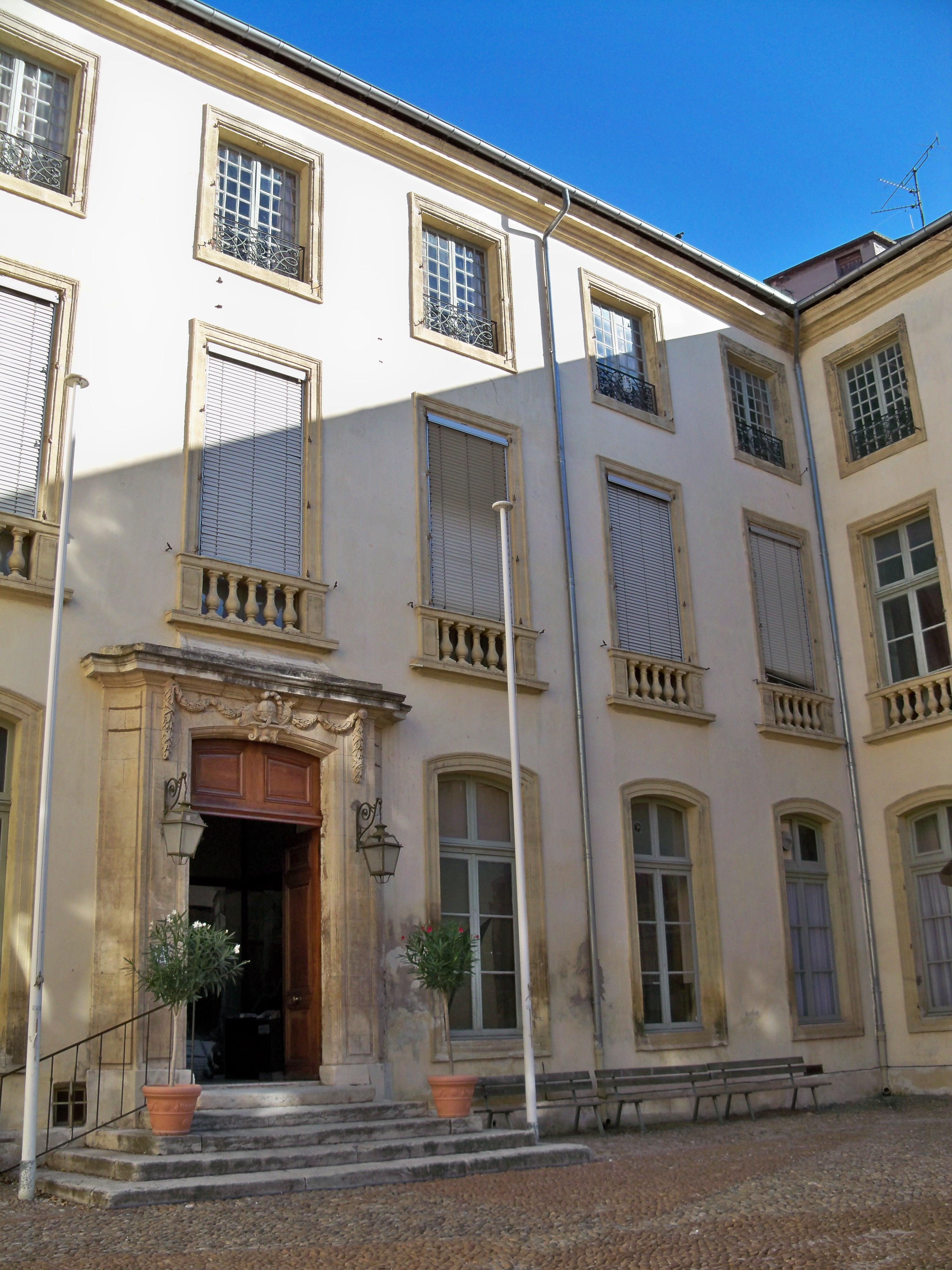 Cours de la Maison Jean Vilar, Avignon (84)